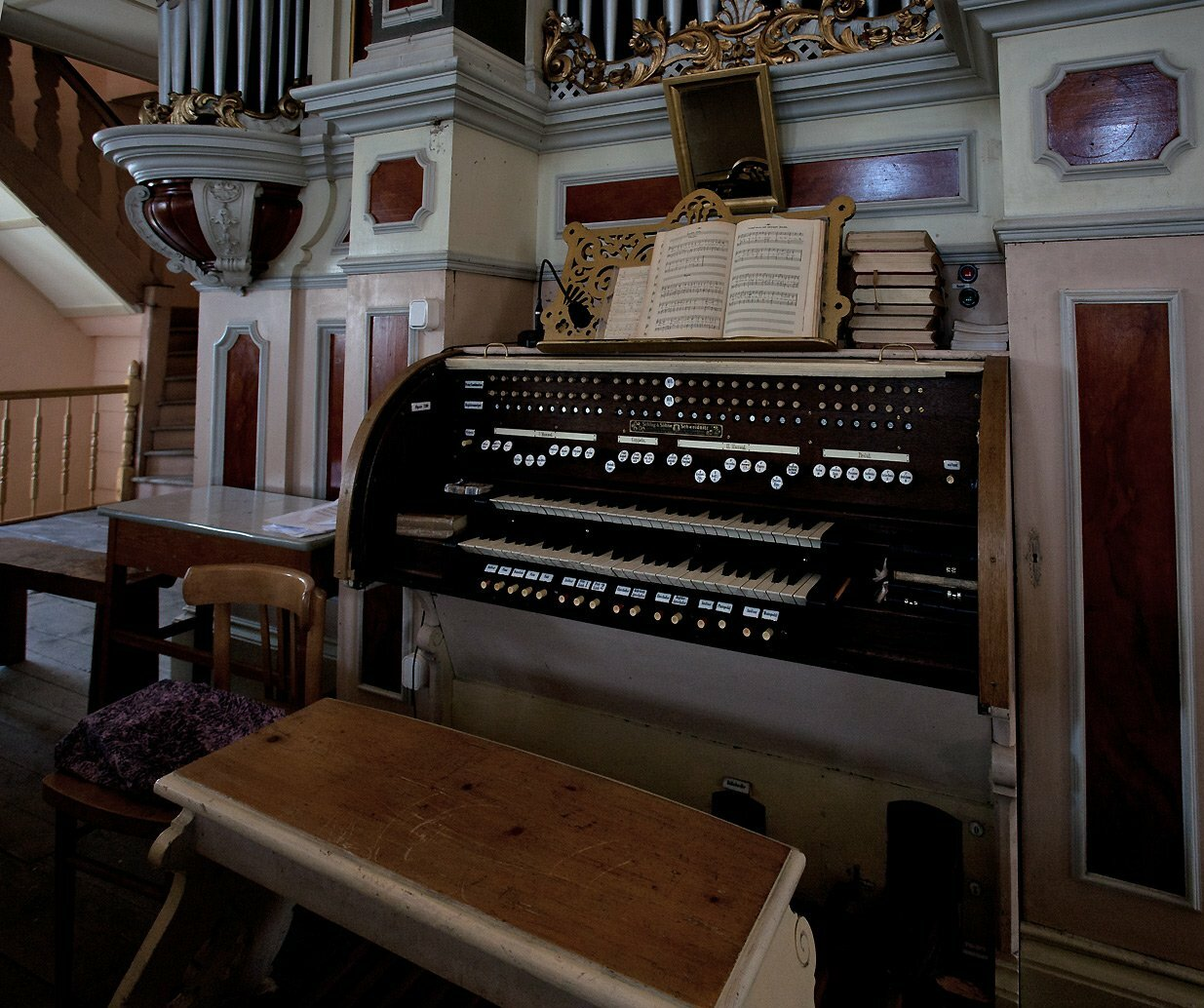 Organy firmy Schlag & Söhne znajdujące się w kościele św. Trójcy w Paszowicach.